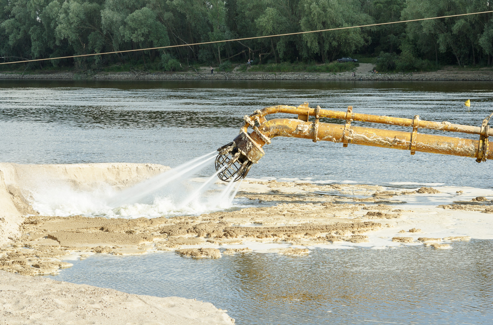 Pogłębiarka „Sawa” - głowica. This is a photography of Natura 2000 protected area with ID PLB140004